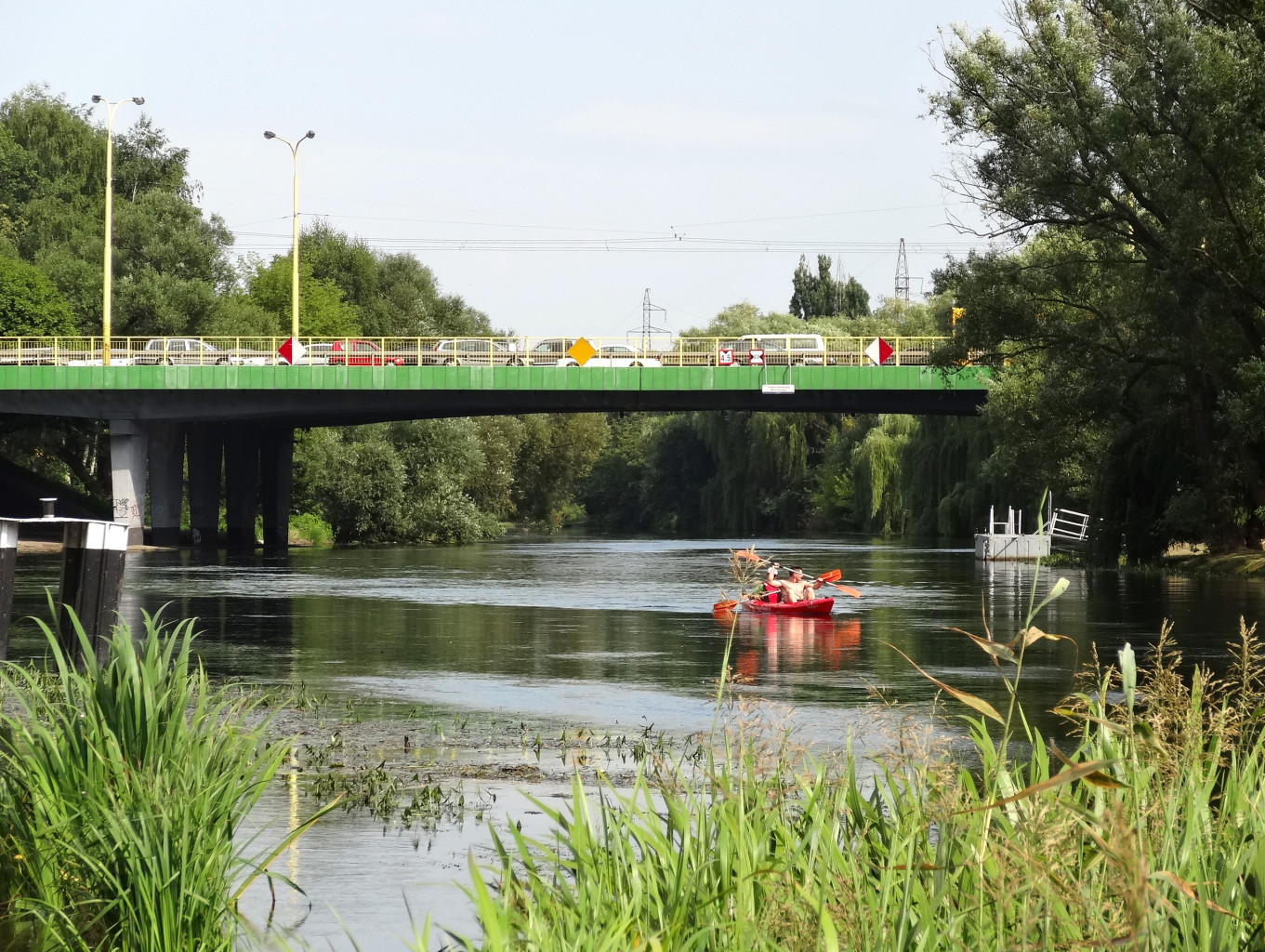 Most Pomorski nad Brdą w Bydgoszczy